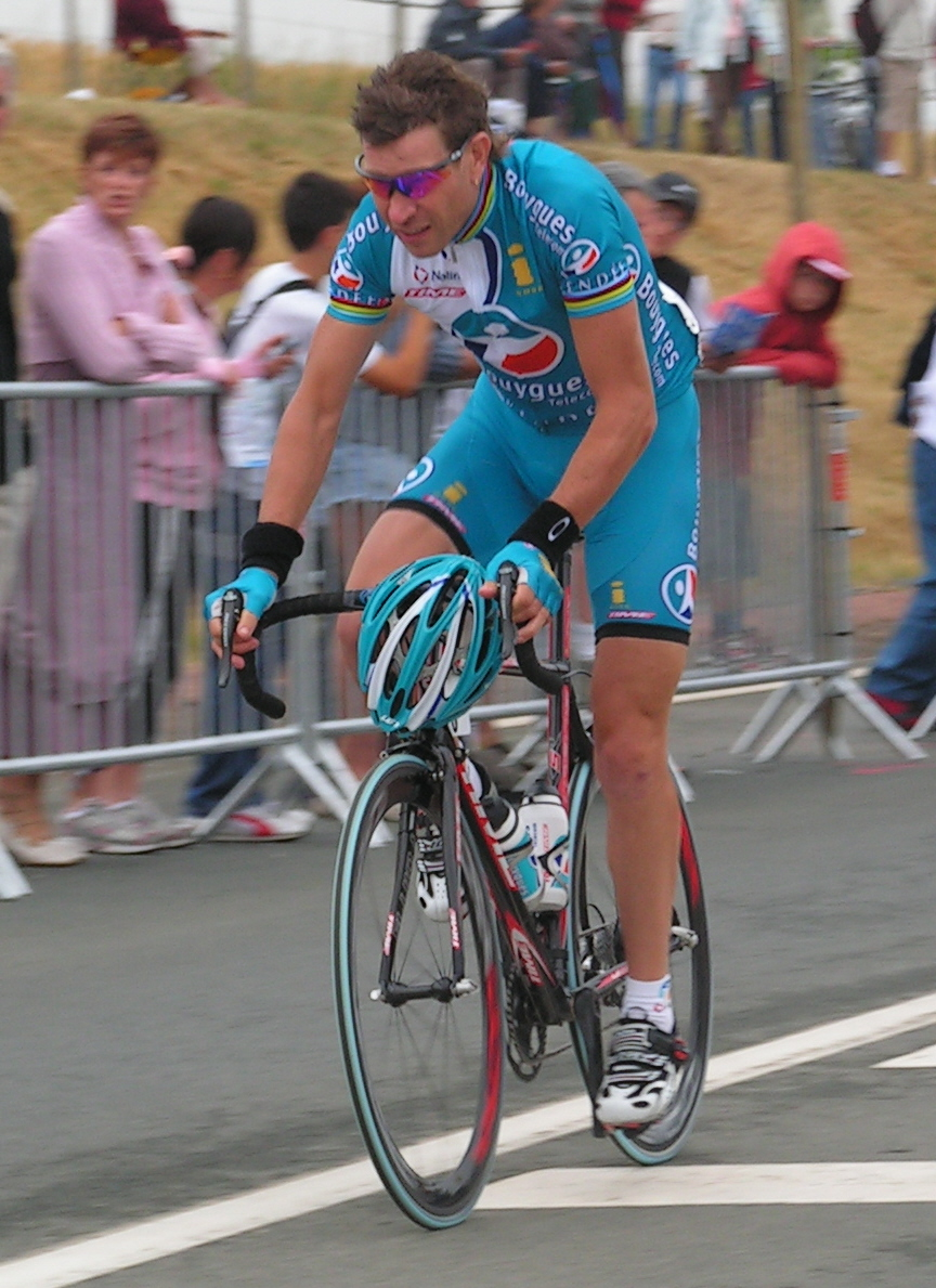 Laurent Brochard avant le départ des championnats de France 2006 à Chantonnay le 25 juin 2006 (photo personnelle)